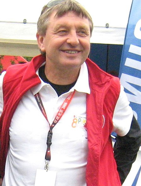 Bogusław Mamiński (ur. 18 grudnia 1955 w Kamieniu Pomorskim) - polski lekkoatleta